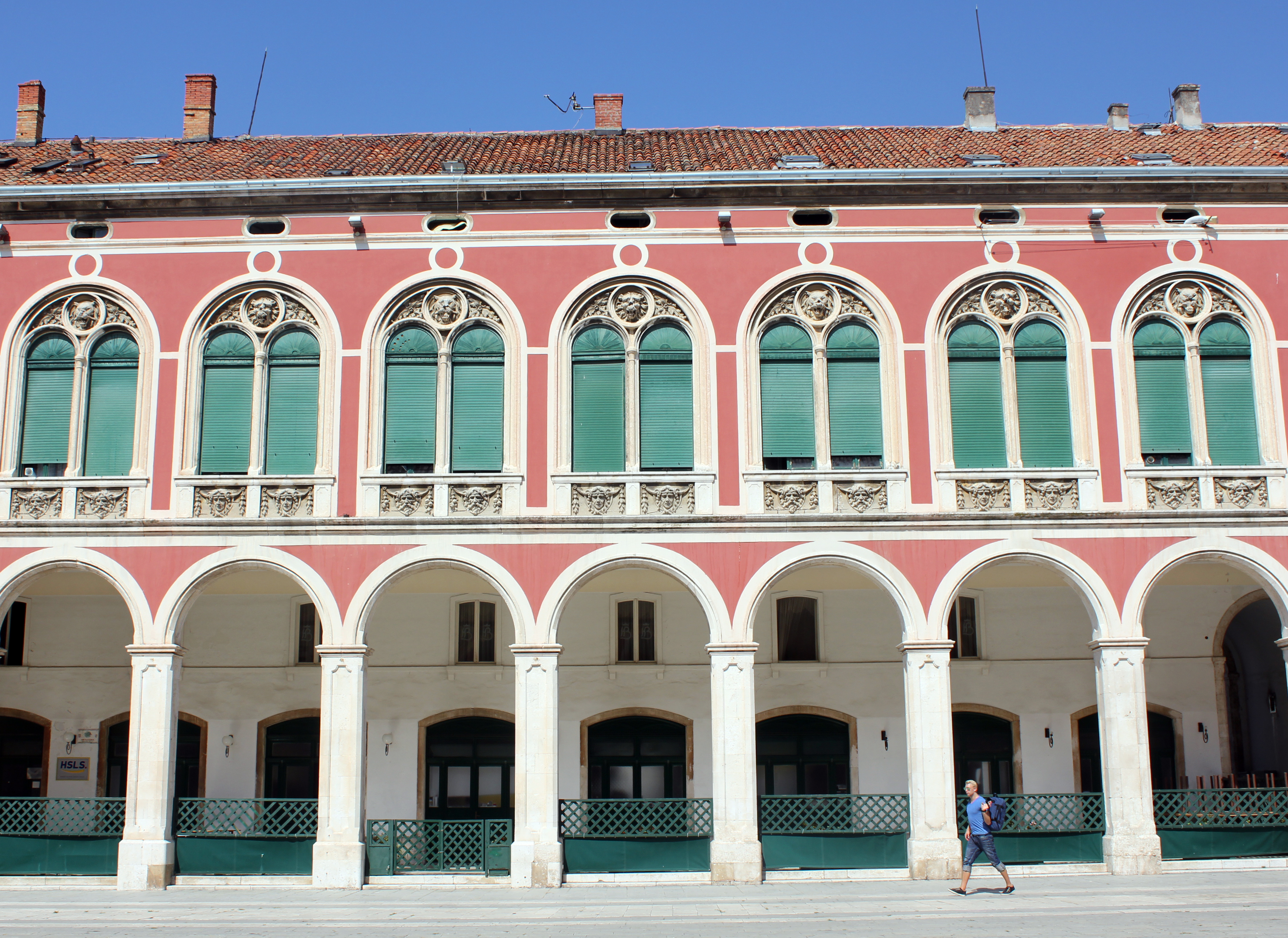 Prokurative (službeno Trg Republike) je poznati splitski trg u središtu grada, zapadno od Dioklecijanove palače, građen po uzoru na starije venecijanske Procuratie.